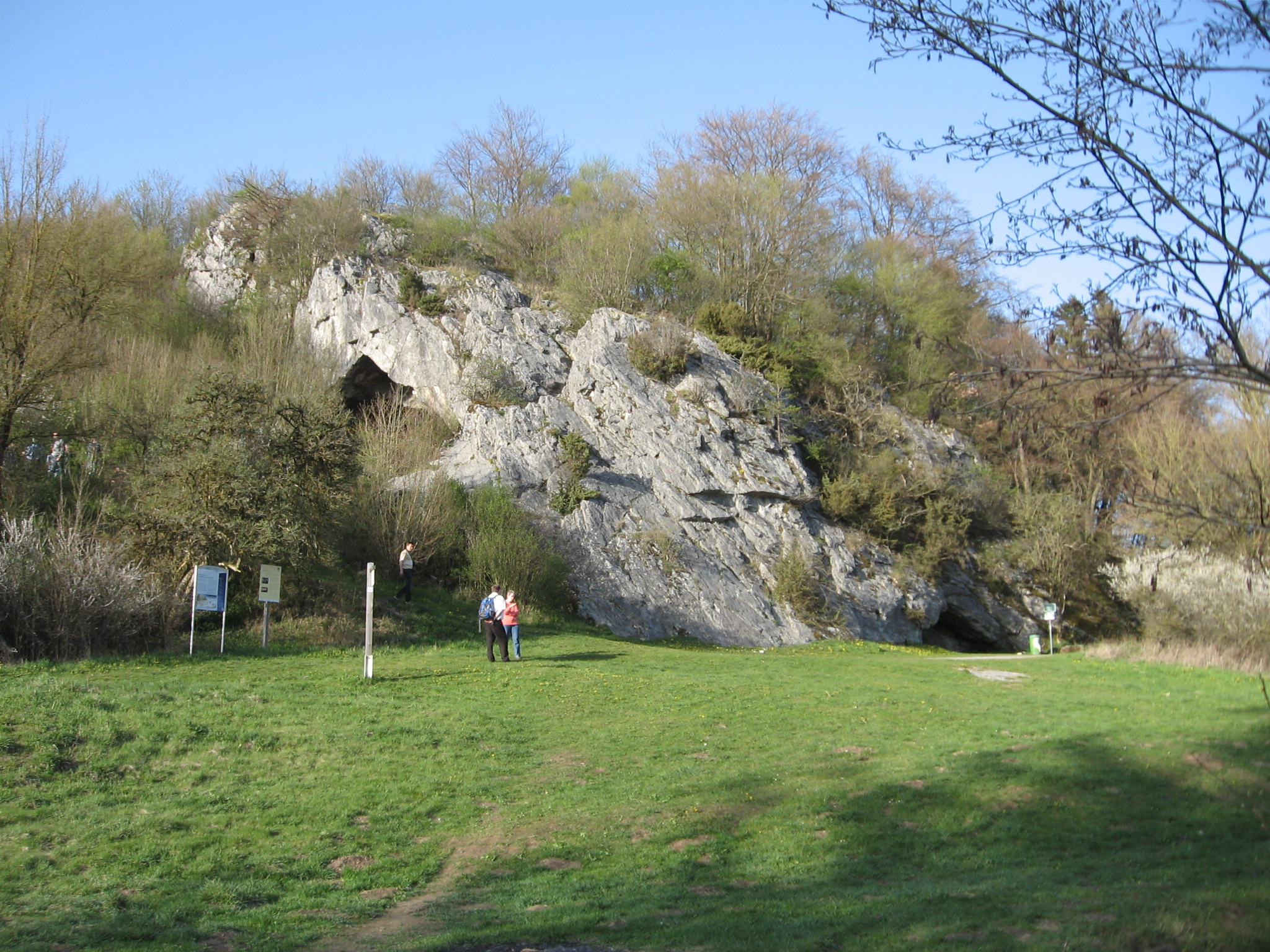 Höhle Hohler Stein aus Richtung Süd von der Lörmeckebrücke